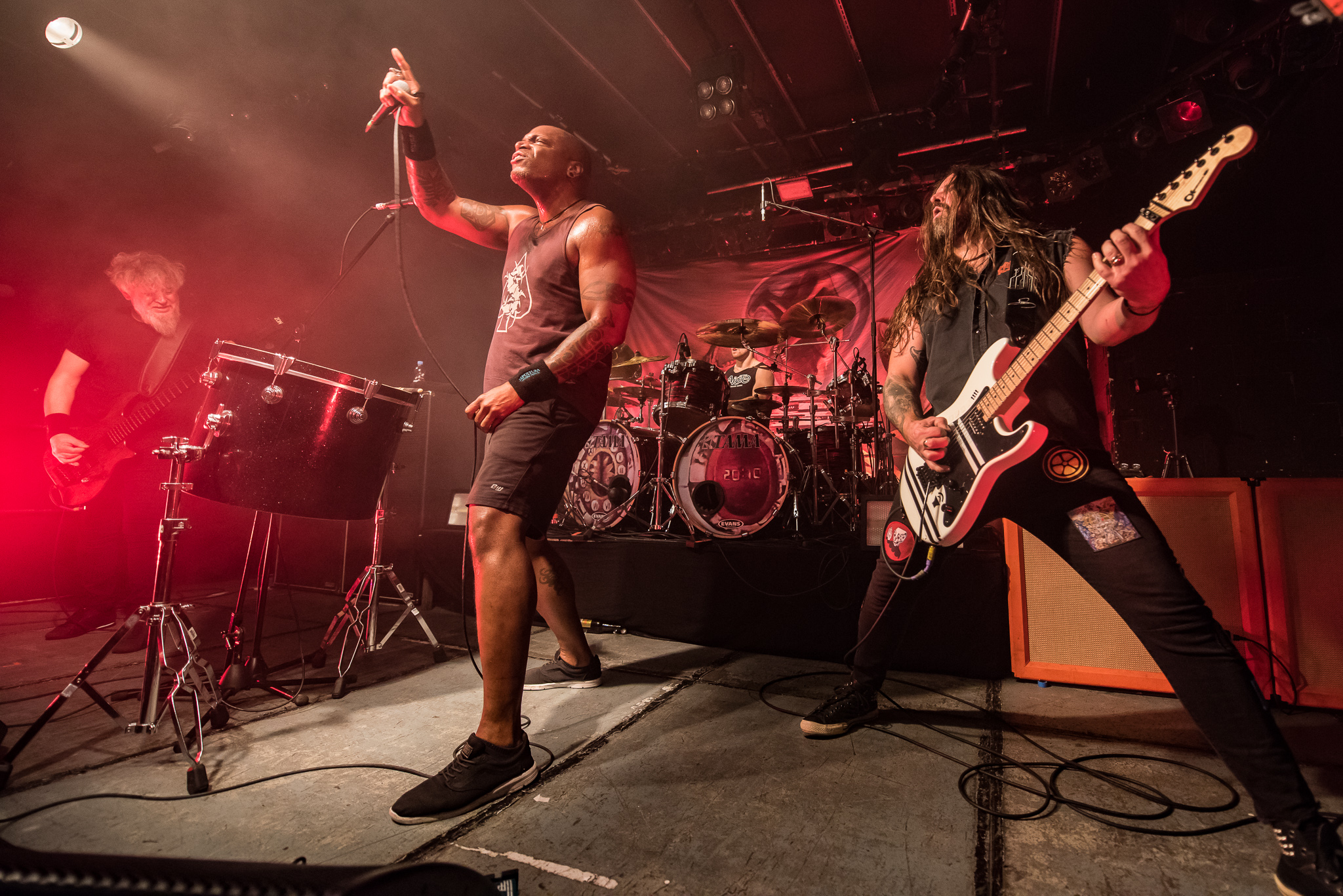 Andreas Kisser,Concertbüro Franken,Der Hirsch,Derrick Leon Green,Eloy Casagrande,Konzert,Livekonzert,Livemusik,Paulo Xisto Pinto Jr.,Sepultura